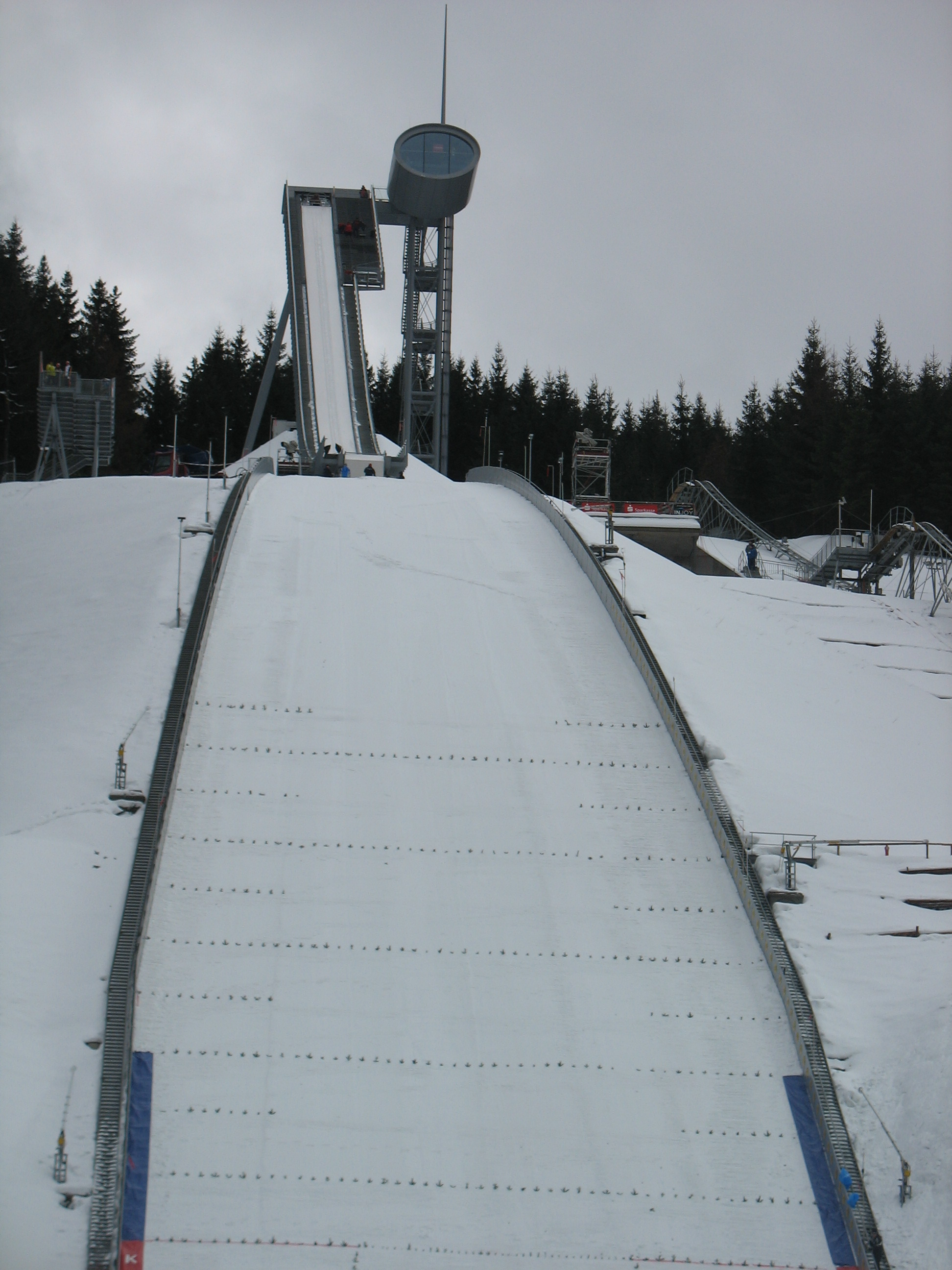 Vogtland Arena Klingenthal im Jahr 2009